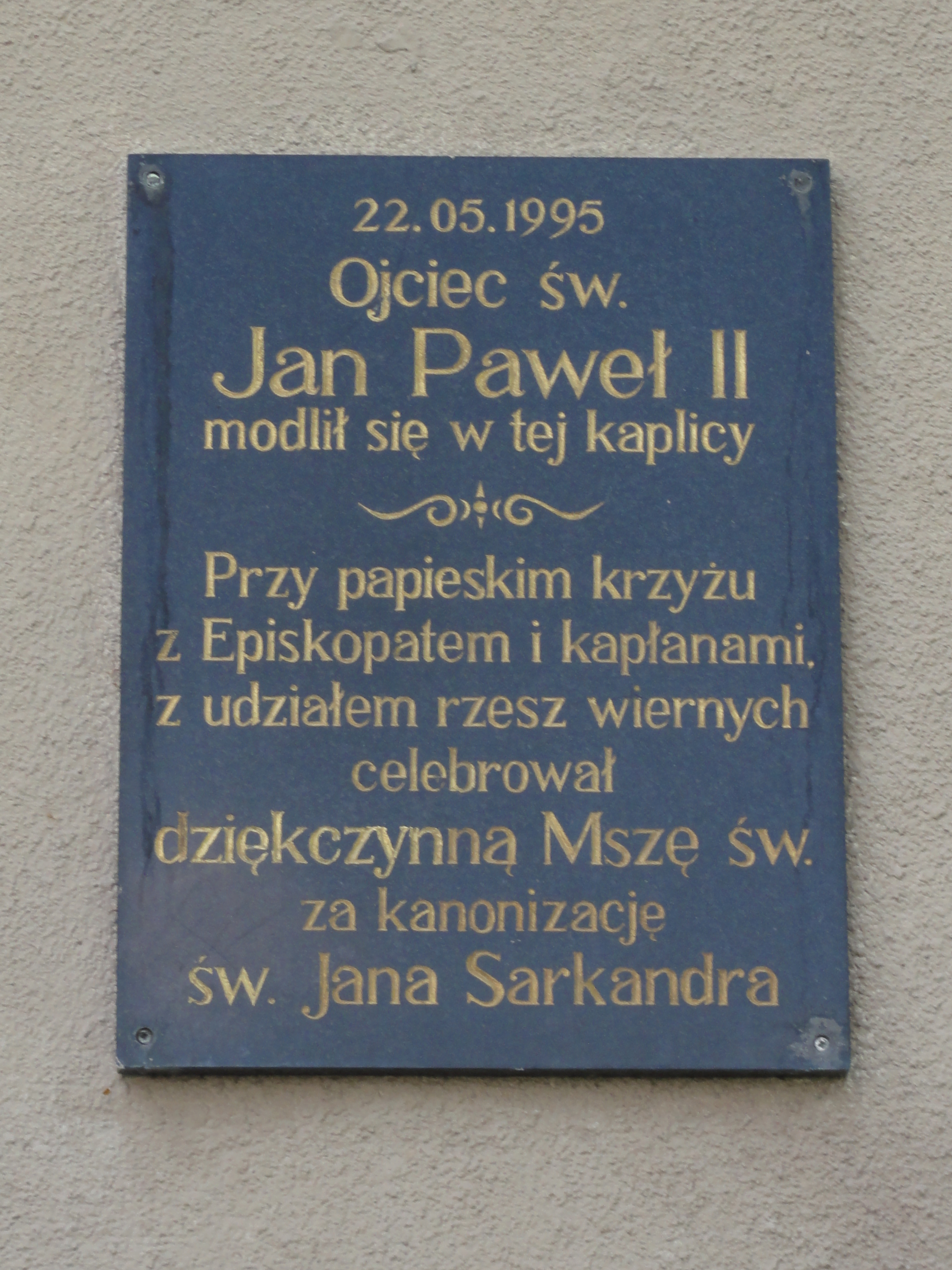 Skoczów Kaplica św. Jana Sarkandra - tabliczka